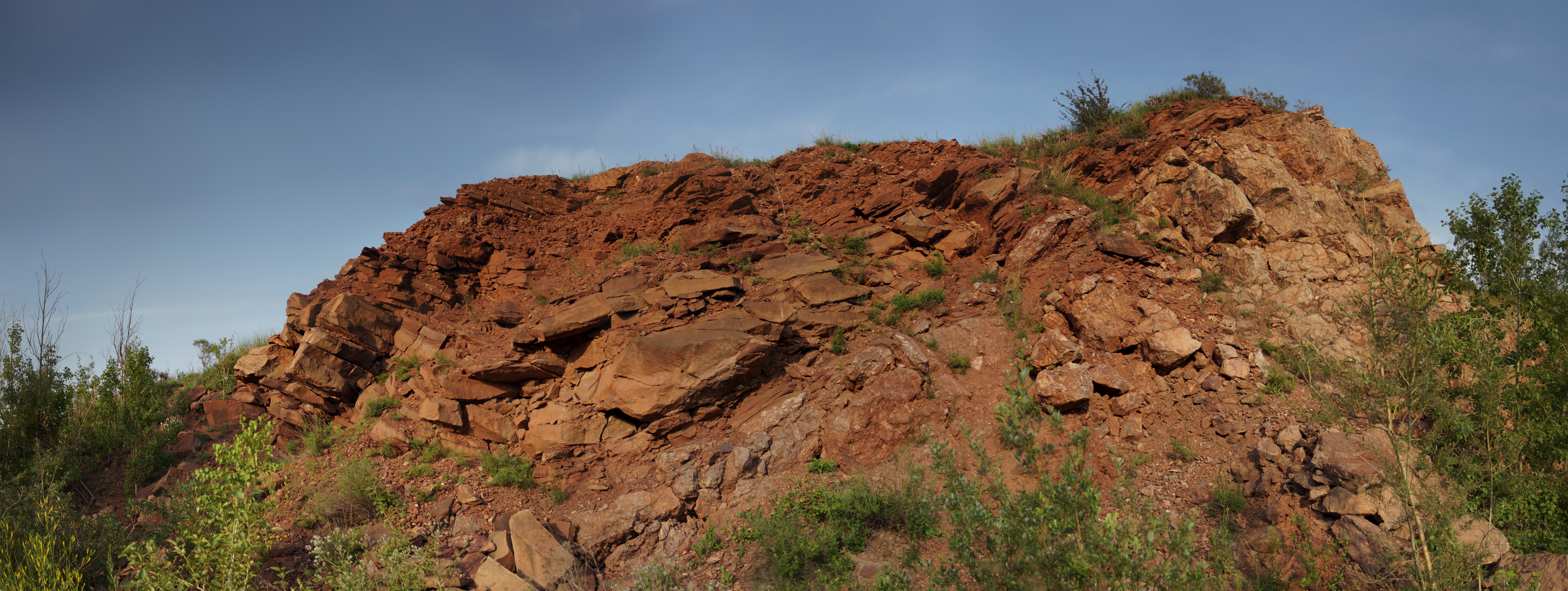 Торгашинское месторождение раннедевонской флоры: Красноярск, Красноярский край На фото синклинальная складка, отчётливо видно несогласное залегание раннедевонских красноцветных пород на размытой поверхности кембрийских известняков. Вид со стороны карьера «Увал Промартели». This image is related to the protected area of Russia number 2410128